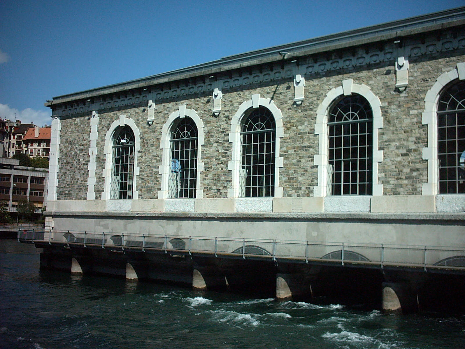 Coursive du bâtiment des Forces motrices à Genève (Suisse)